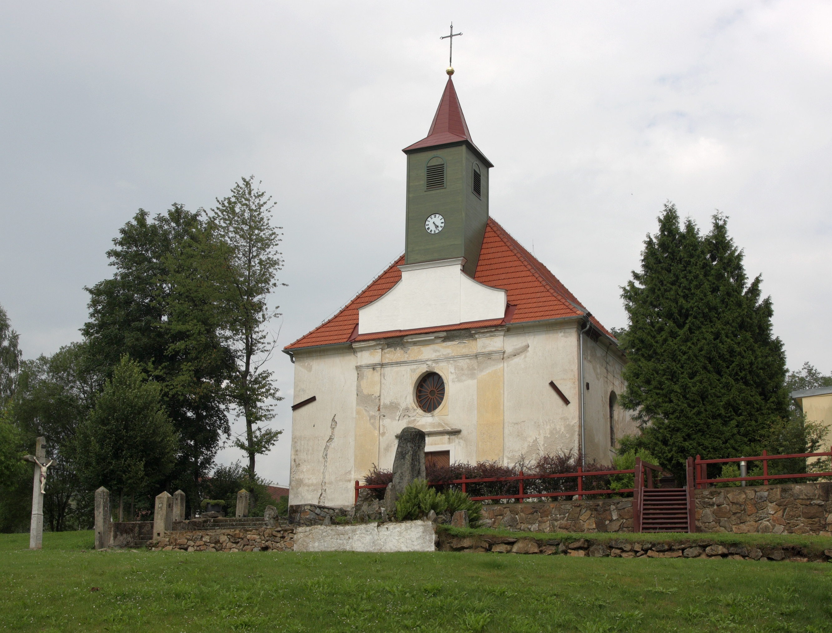 Pohorská Ves - kostel svatého Linharta.